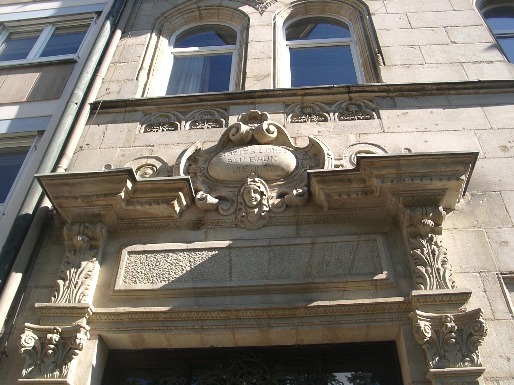 Hornschuchpromenade 13, Fürth